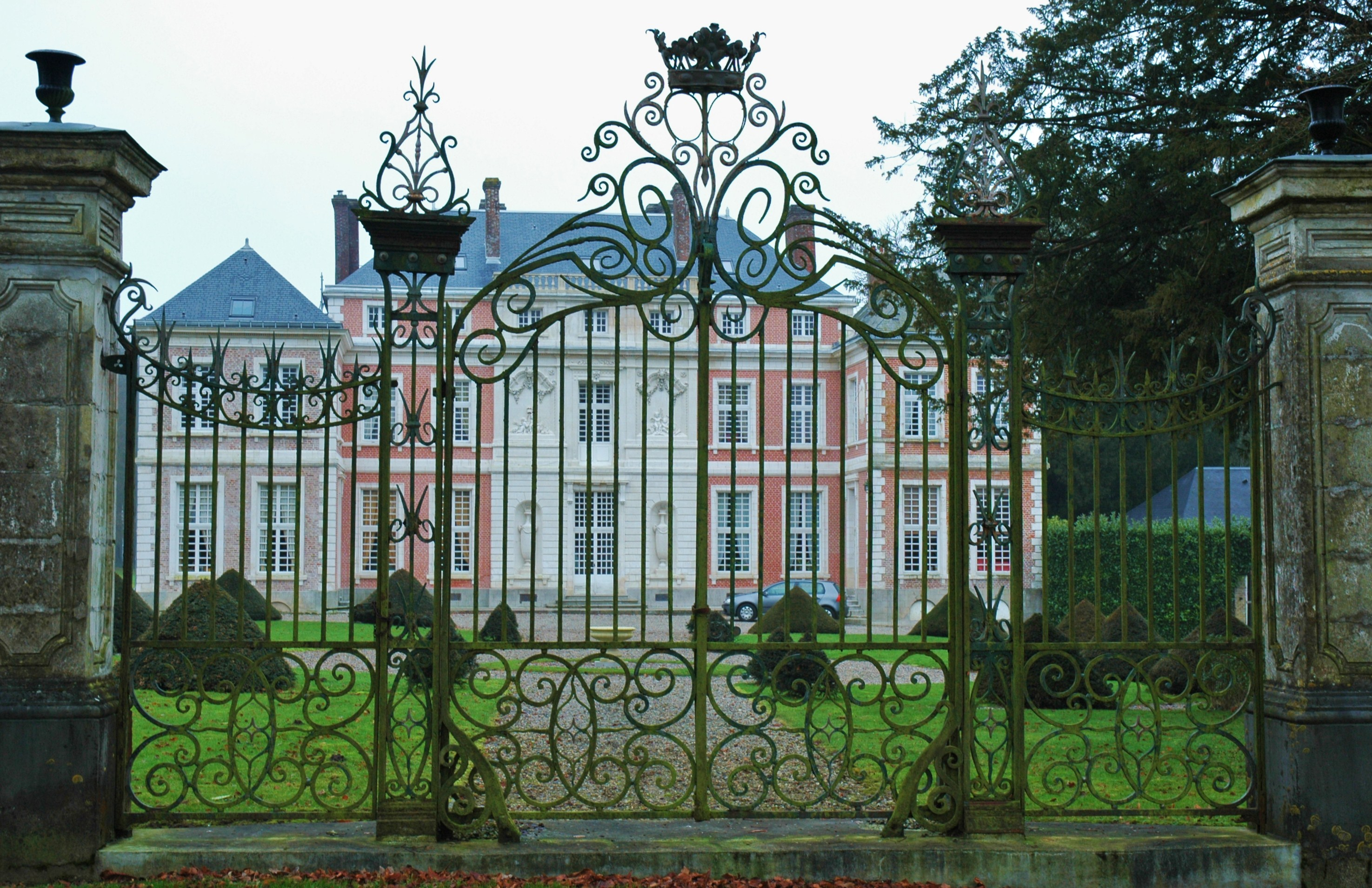 Brailly-Cornehotte (Somme, France). Le château.